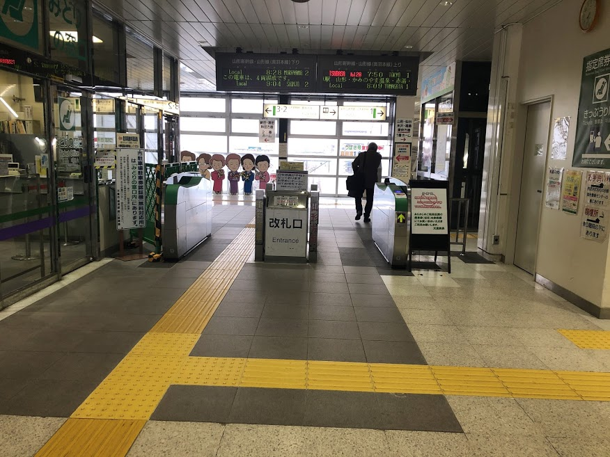 天童駅の改札口